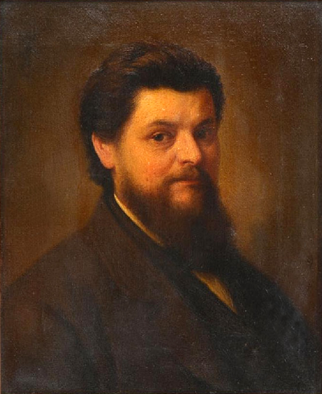 Porträt eines bärtigen Mannes